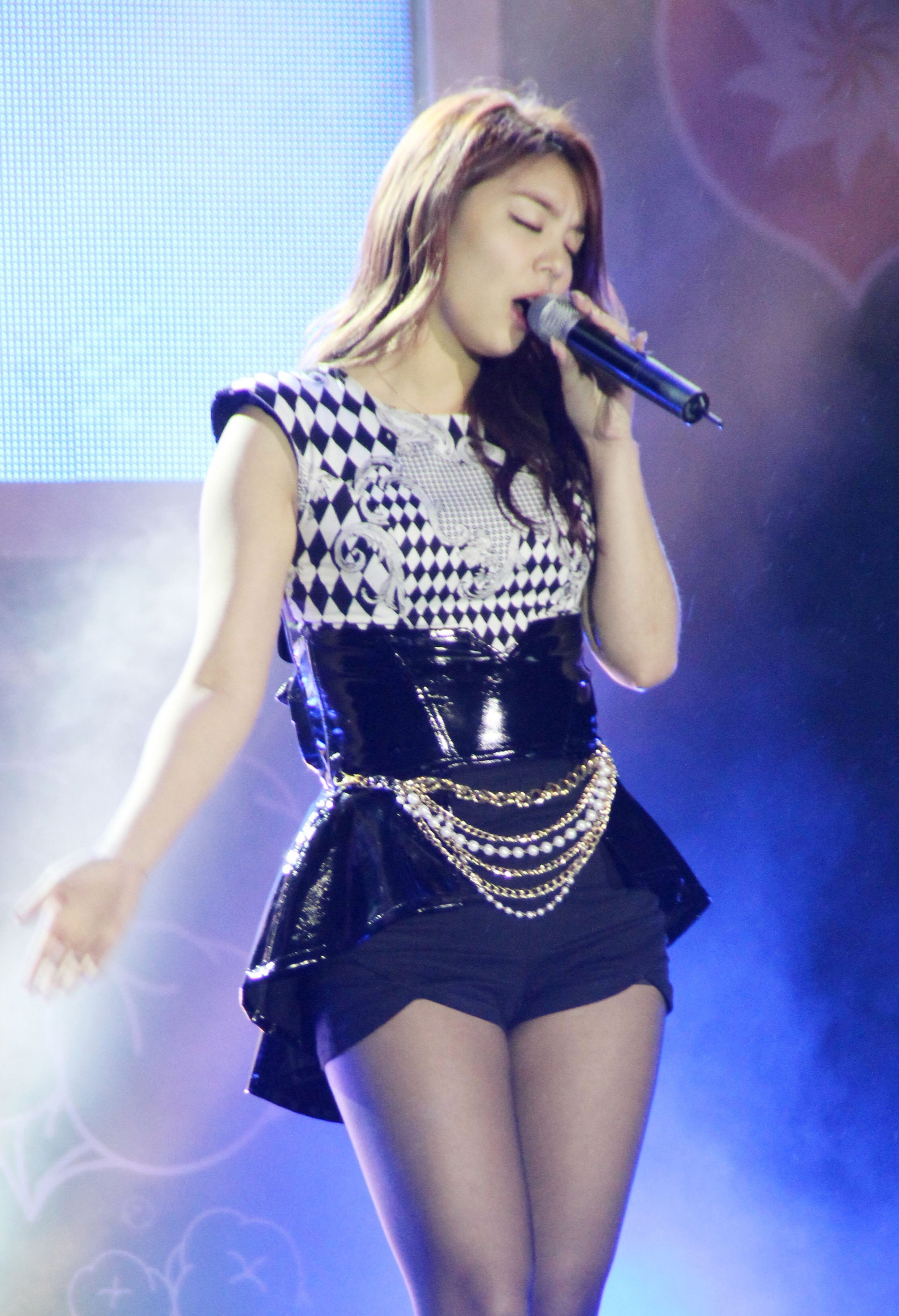 130929 양주목화페스티벌 기타 가수 직찍